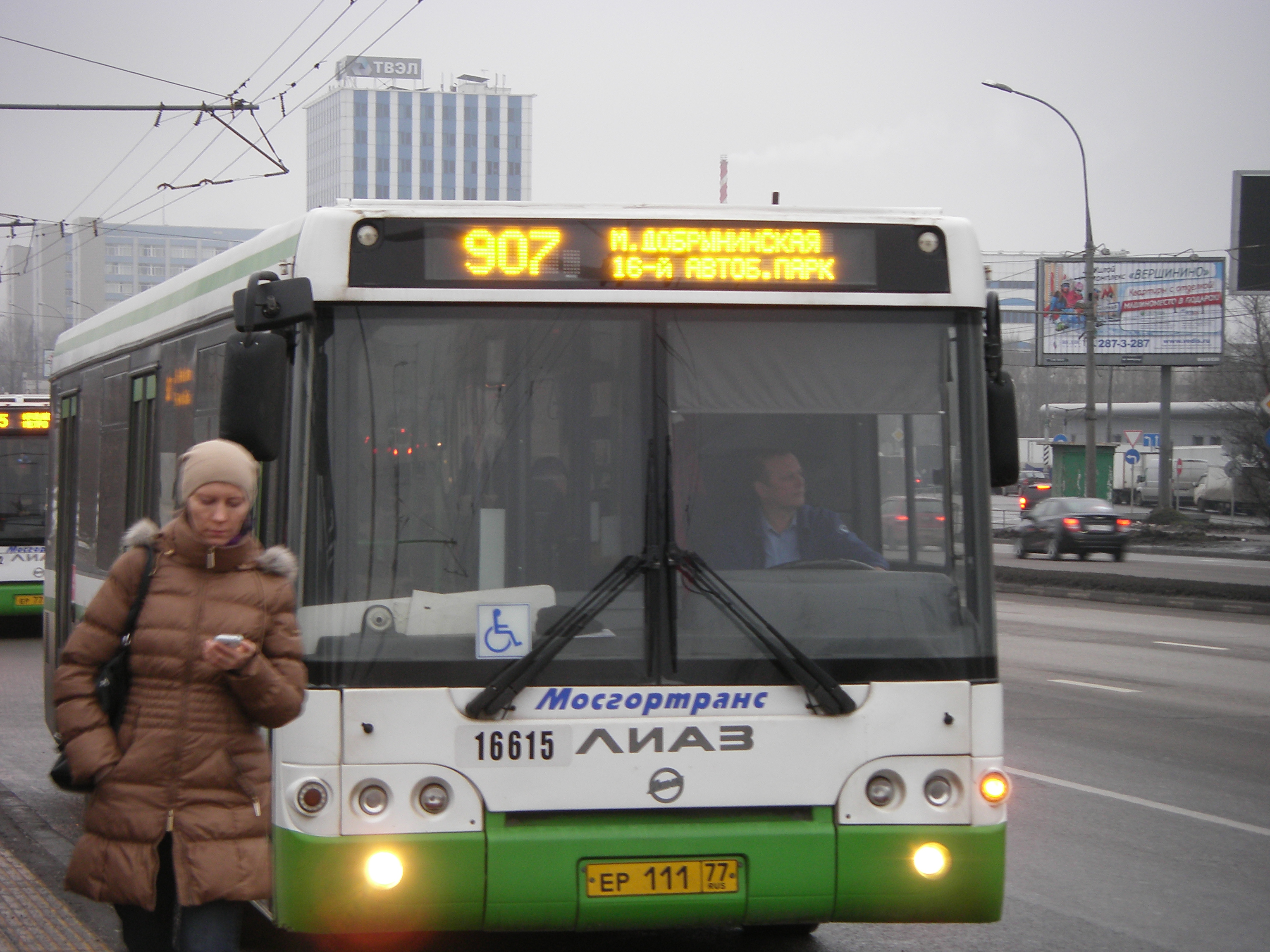 Автобус маршрута 907 на остановке «Сабурово» (направление из центра) 7 января 2014 года в Москве